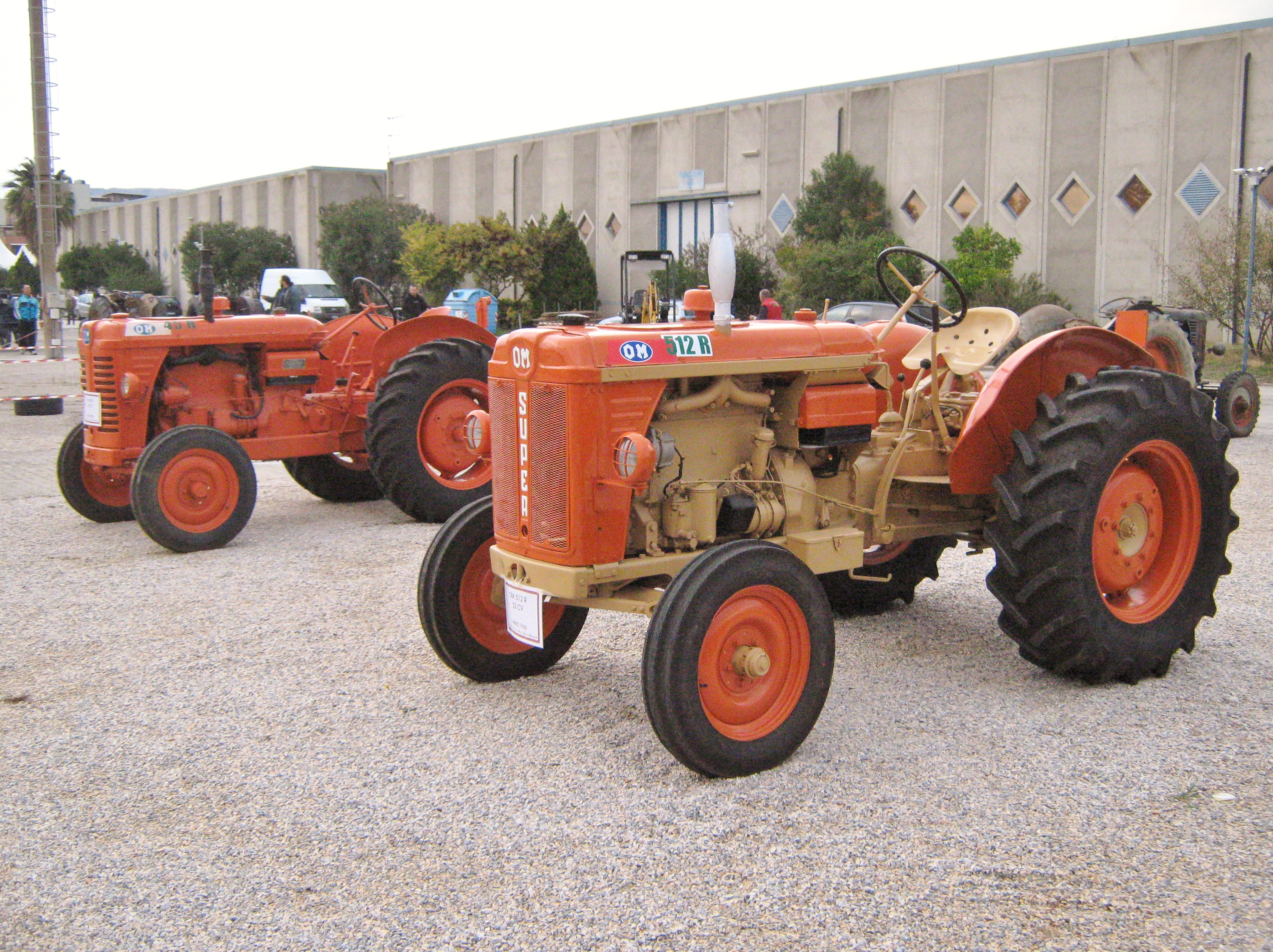 Trattori OM (512R e 45R) esposti all'Expo Model di Venturina 2011 (LI).